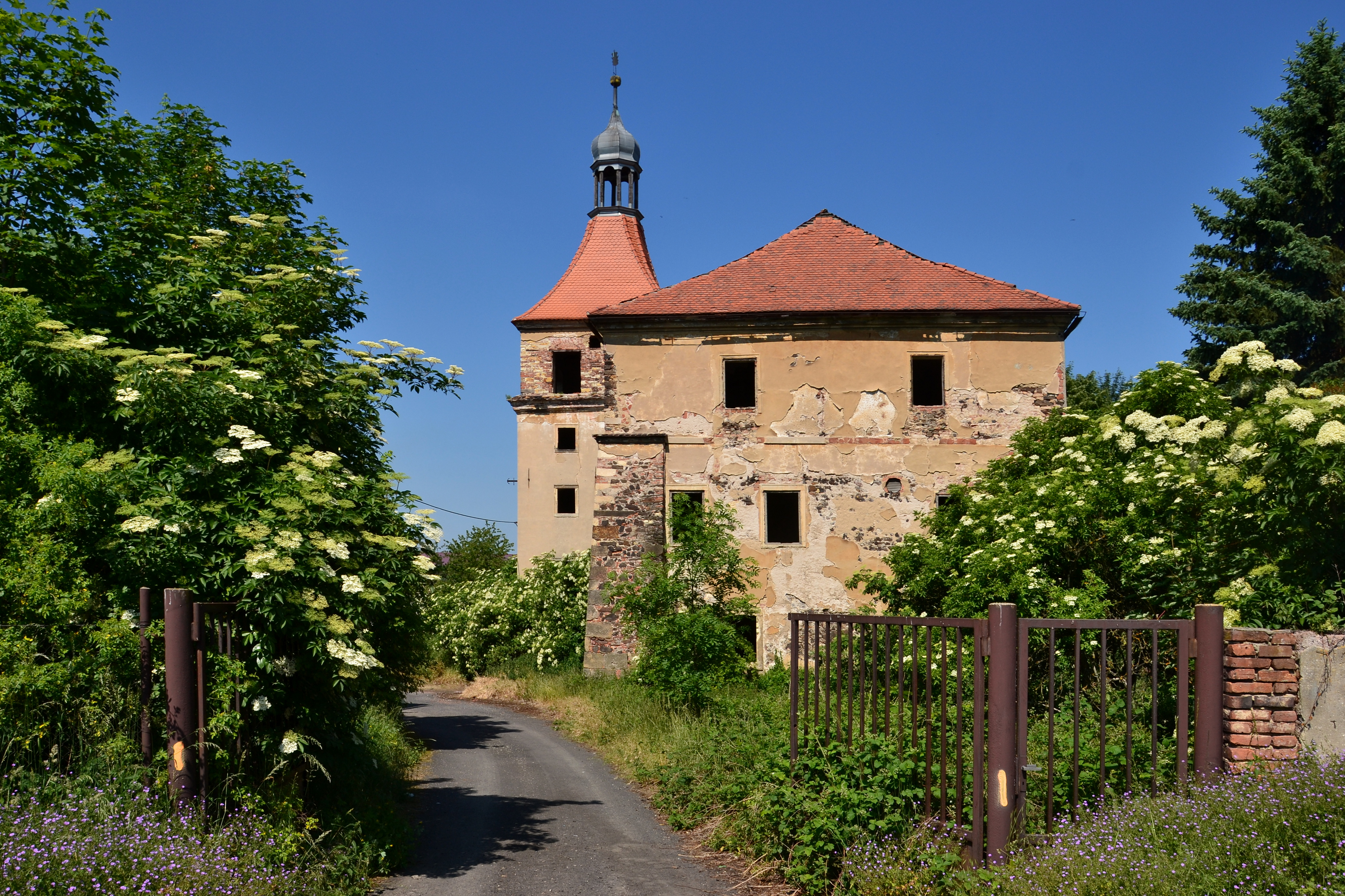 Vjezd do dvora